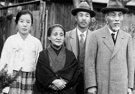 나혜석과 그의 후원자 야나기하라 부부